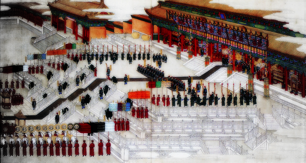 中文（中国大陆）: 《光绪皇帝大婚图》之一